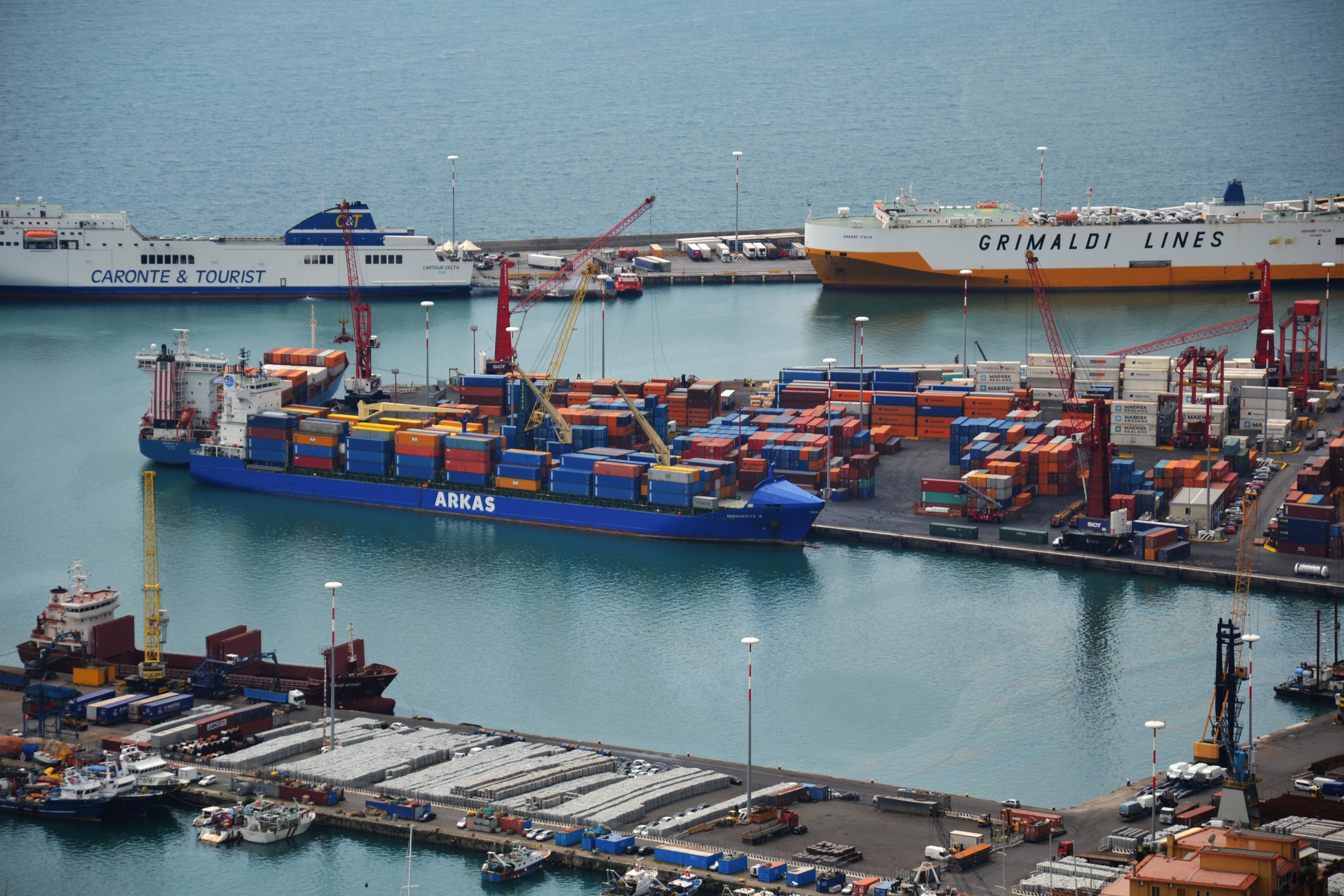 Vista del Porto di Salerno